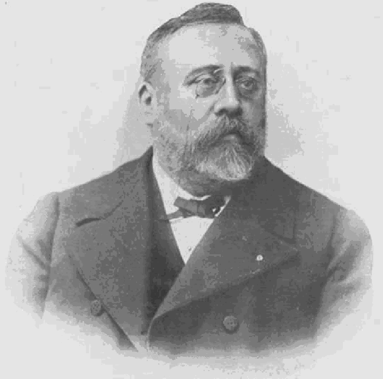 French jurist Adhémar Esmein (1848-1913)